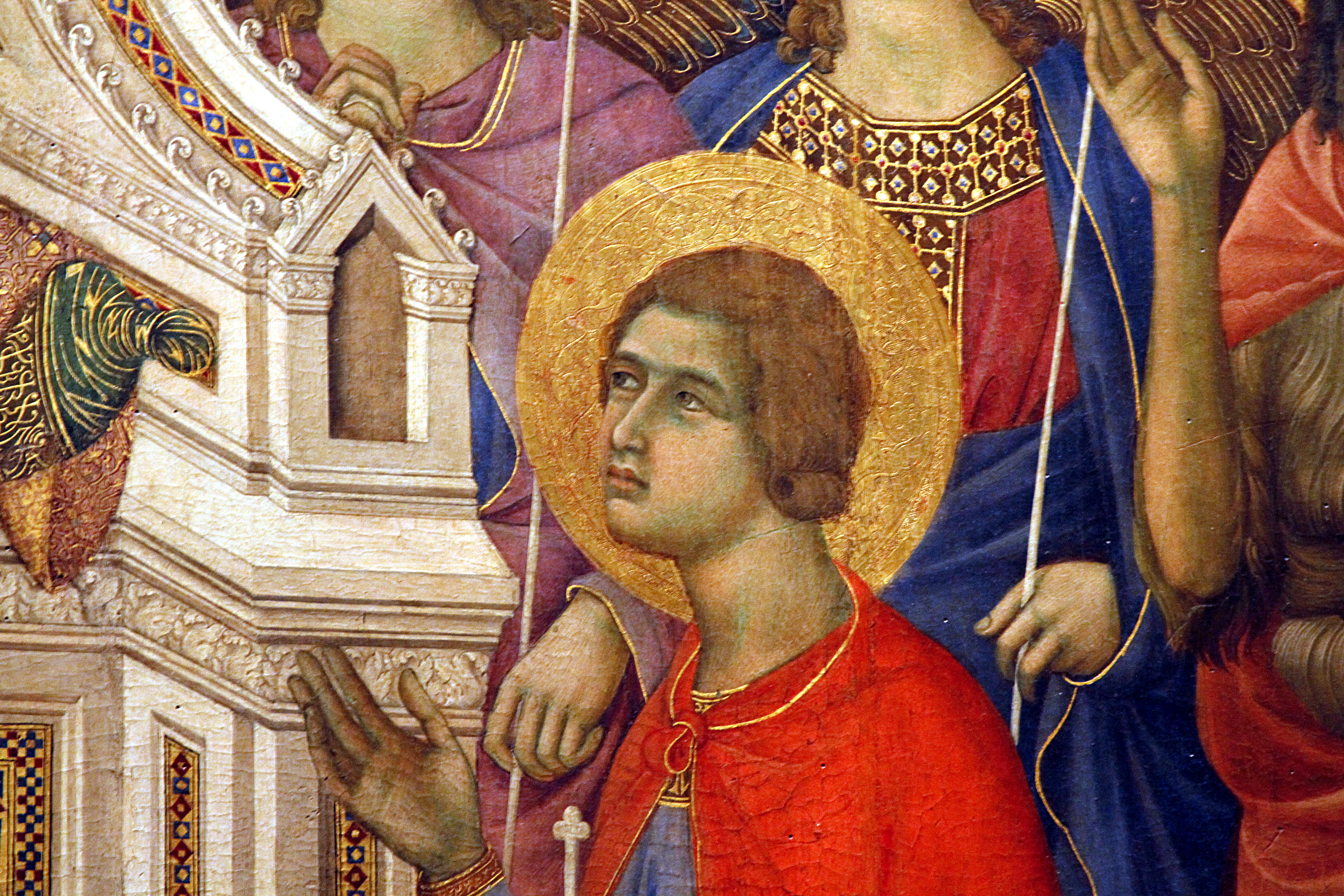 Maestà - Museo dell'Opera del Duomo - Siena